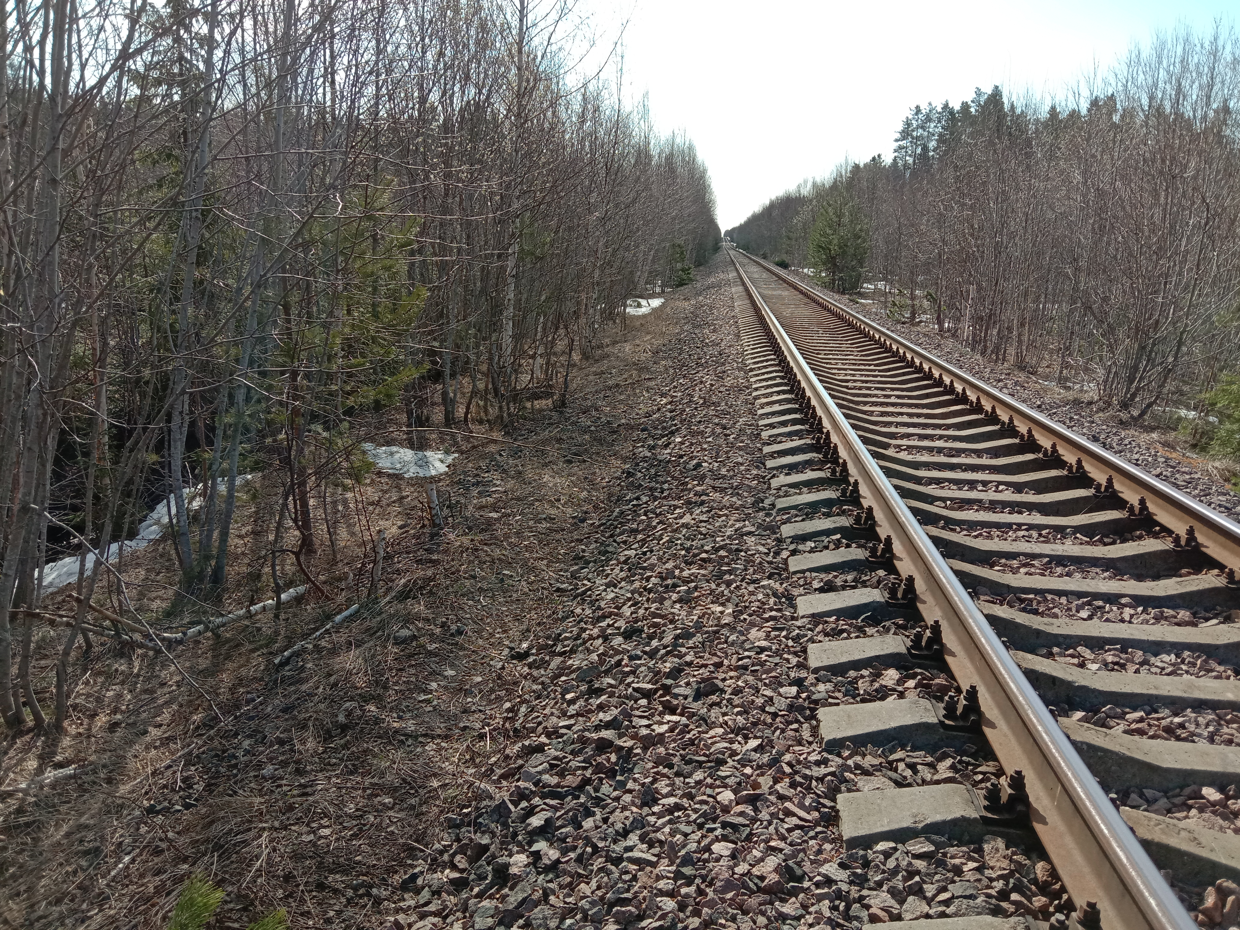 Разъезд Ууксу II